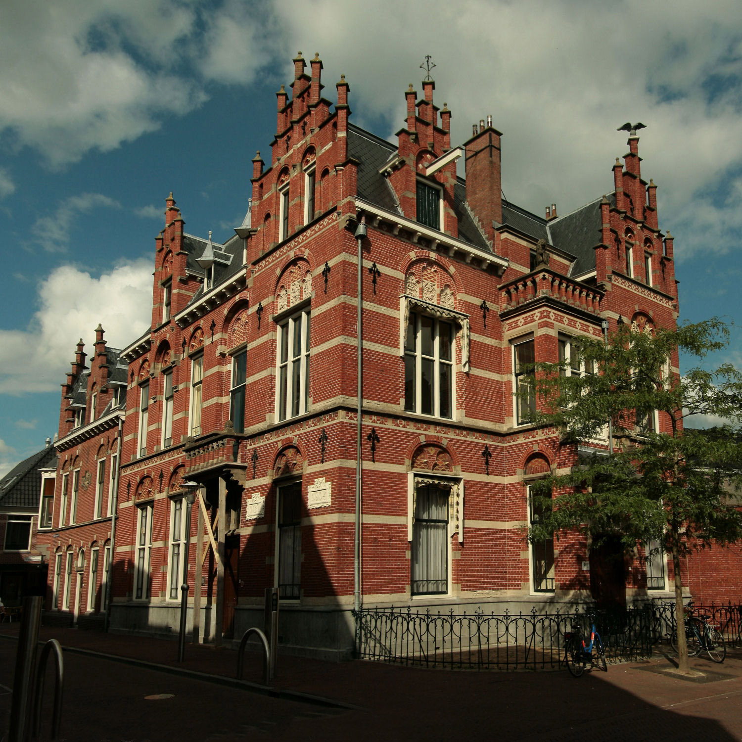 Administratiegebouw O.B.W. Sneek. In 1904 in rijke neo-gothische stijl gebouwd naar ontwerp van Nicolaas Molenaar. Op de begane grond kantoren en voogden- en voogdessenkamers van het Old Burger Weeshuis. Op de bovenverdieping oorspronkelijk een telegraafkantoor, vandaar de spreuk op de gevel: URBI ET ORBI (stad en wereld) Kleine Kerkstraat Sneek. Zaterdag 4 September 2010.